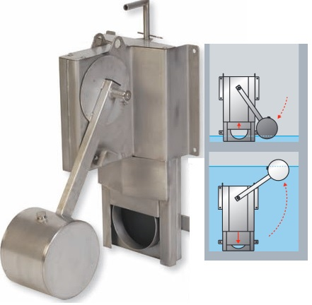 Accesorio de regulación hidráulica-caudal -Un flotador conectado a un brazo se desplaza según la altura del agua, el brazo va rrastrando una guillotina móvil que más o menos cierra el paso del agua